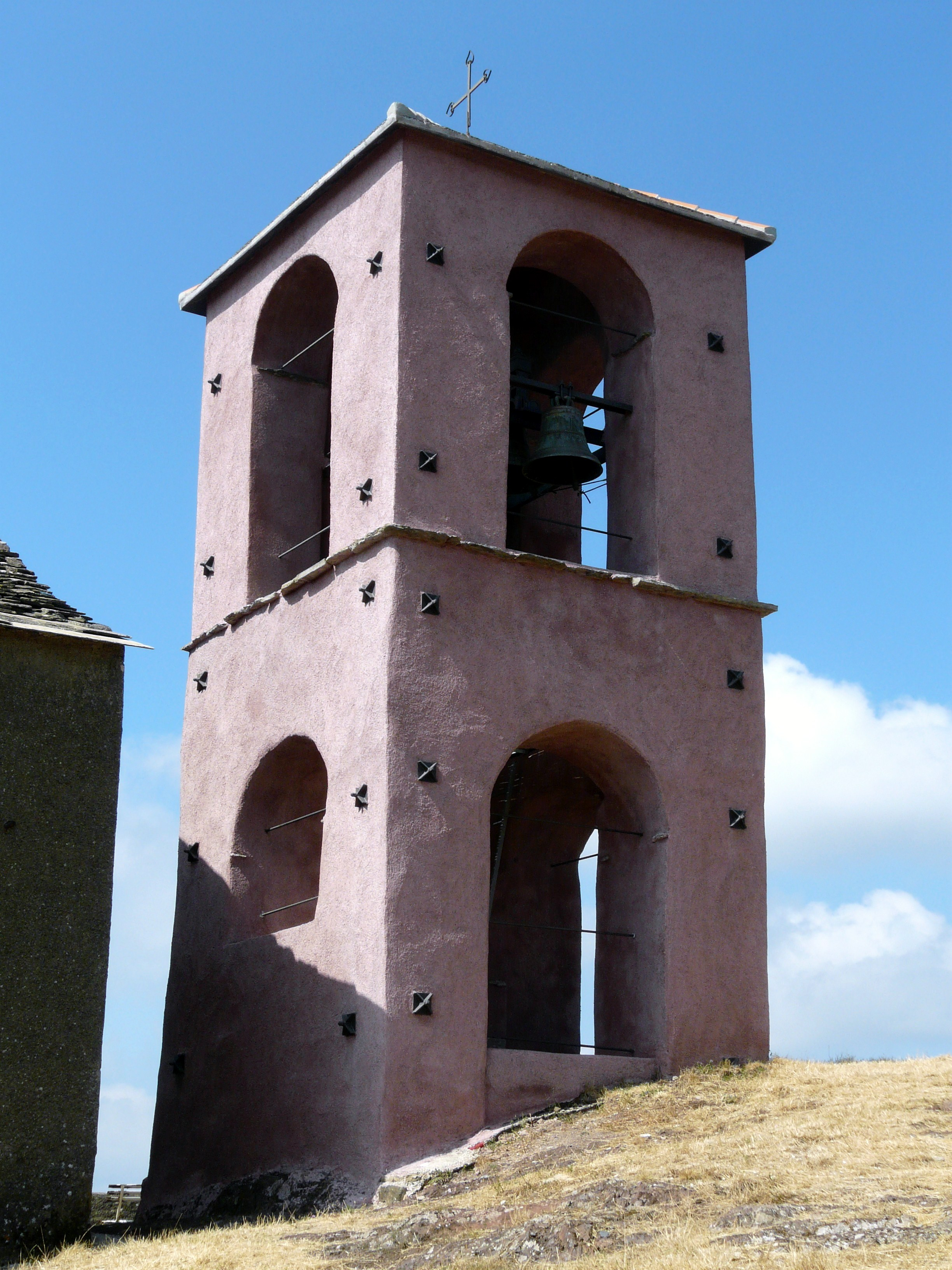 Chiesa di San Giovanni Decollato, Beverone, Rocchetta di Vara, Liguria, Italia